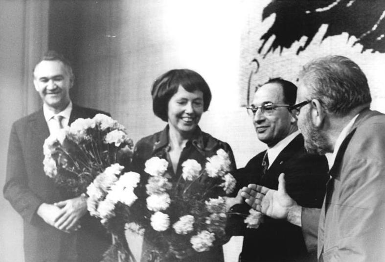 ADN-ZB Katscherowki 9.7.71 Berlin: Ruth Berghaus als Intendantin des BE eingeführt Der Minister für Kultur der DDR, Klaus Gysi (2.v.r.), führte die bisherige stellvertetende Intendantin des Berliner Ensemble am 9.7.71 in ihr Amt als Intendantin ein. Glückwünsche für ihre verantwortungsvolle Arbeit überbrachte auch Prof. Wolfgang Heinz (r.), Präsident des Verbandes der Theaterschaffenden der DDR.